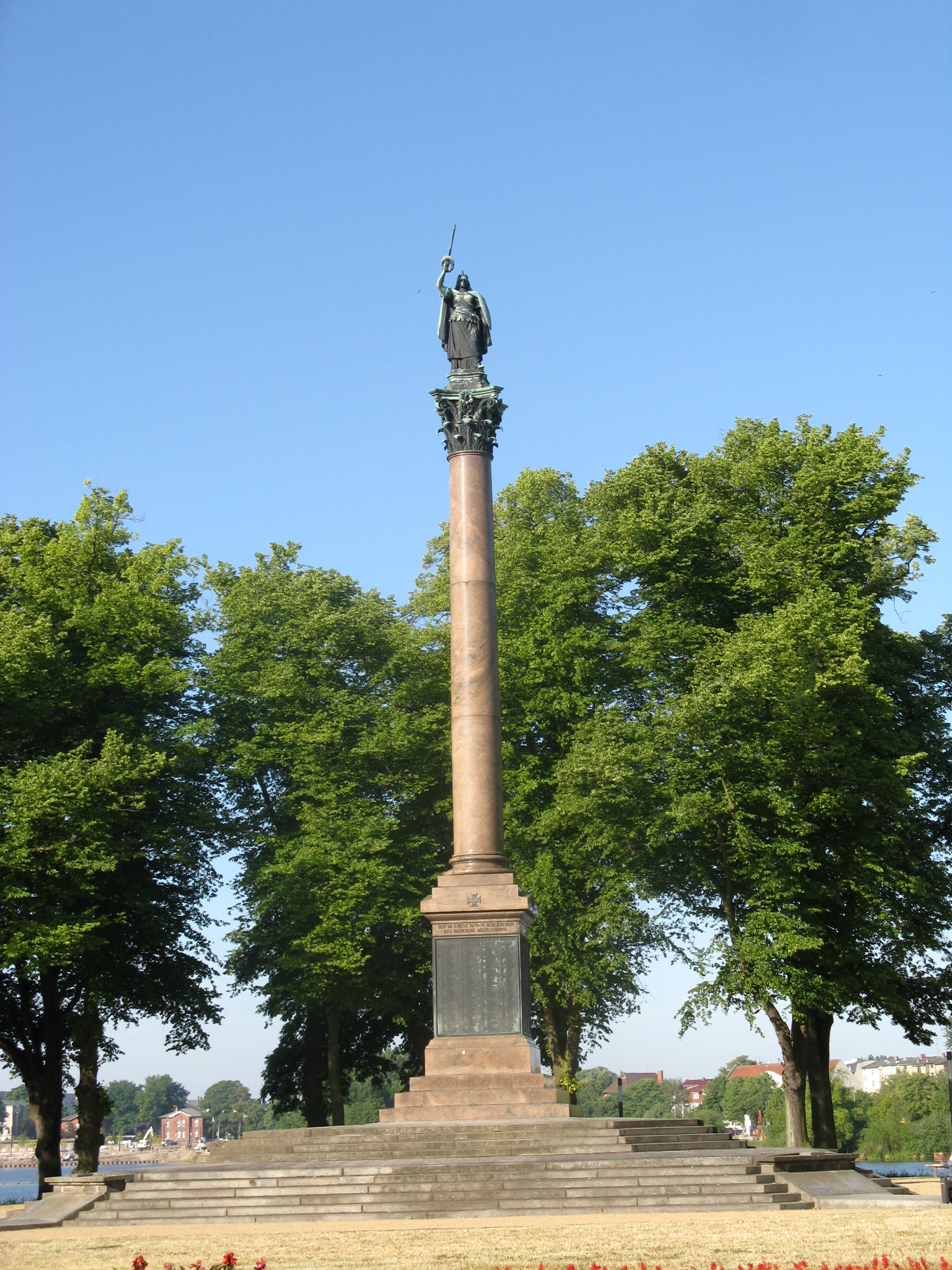 Siegessäule mit bekrönender Figur „Megalopolis“, Kriegerdenkmal 1864, 1866, 1870/71 des Landes Mecklenburg-Schwerin, Einweihung 1874 durch Hermann Willebrand (Architekt der Säule) und Gustav Willgohs (Figur)